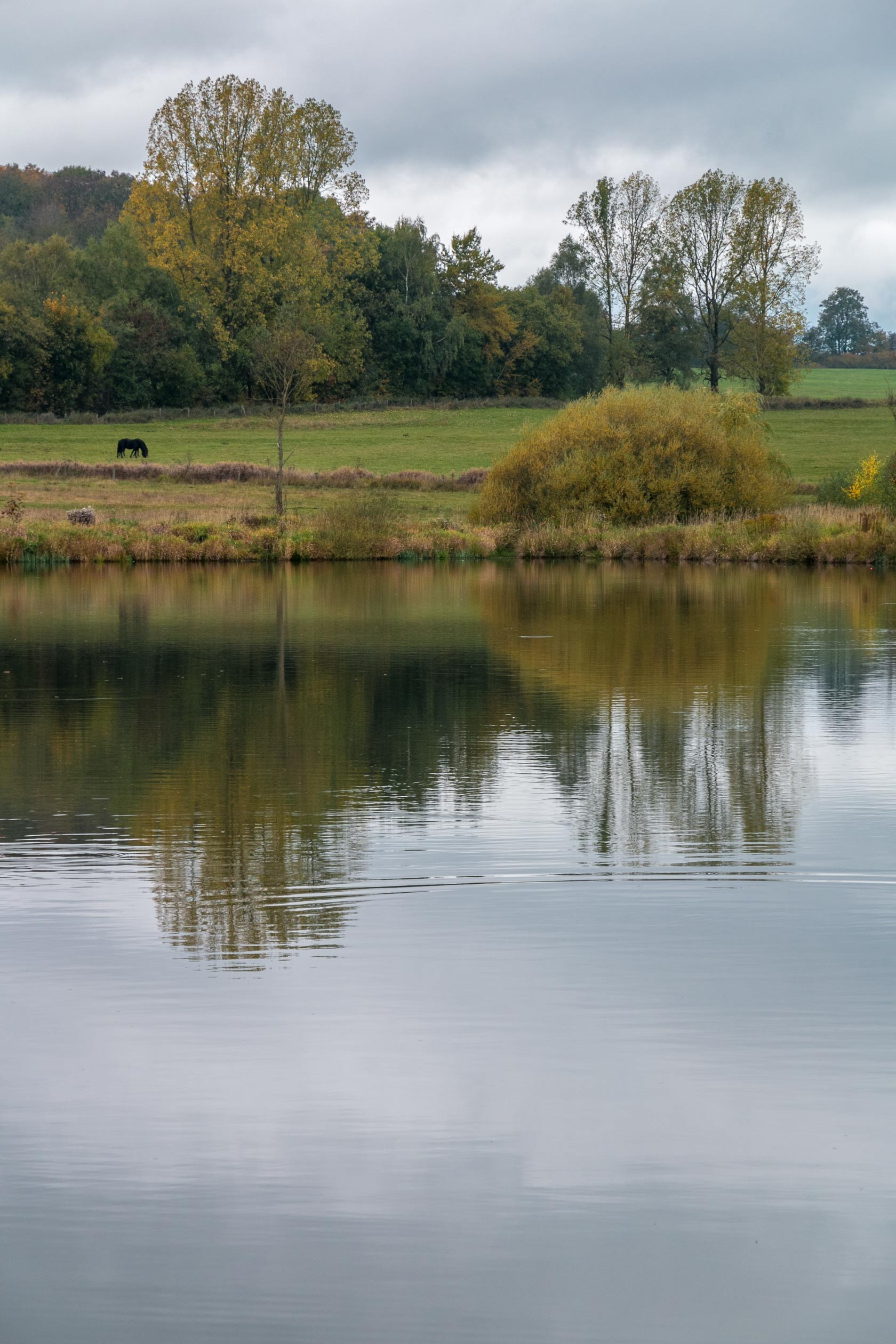 Der Streckweiher bei Seck im Herbst